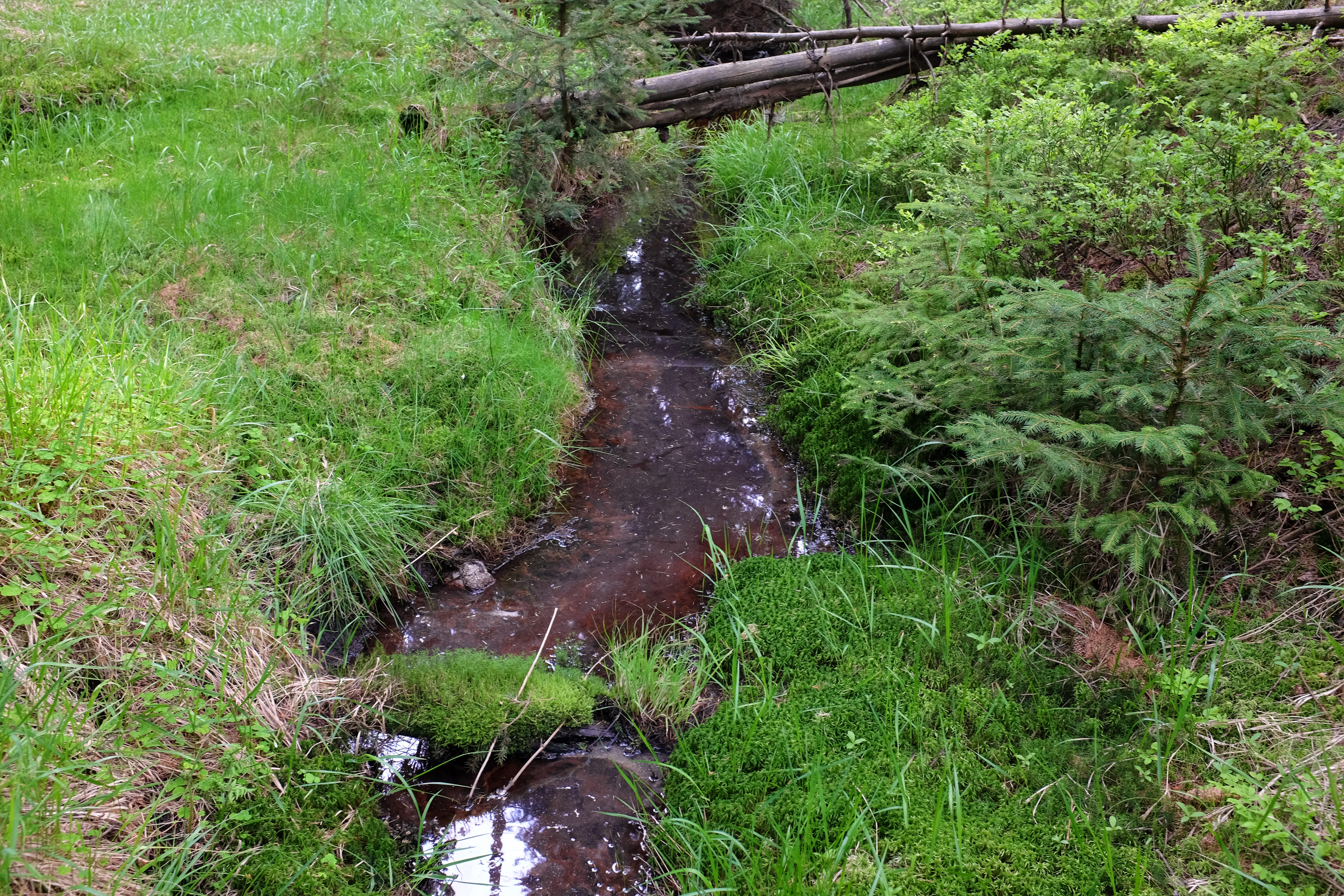 Potok Limnice, přítok Rolavy, u osady Oldřichov v Krušných horách, okres Karlovy Vary